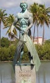 Roberto Cofresí (1791 - 1825). Pirata puertorriqueño(Monumento en Cabo Rojo)